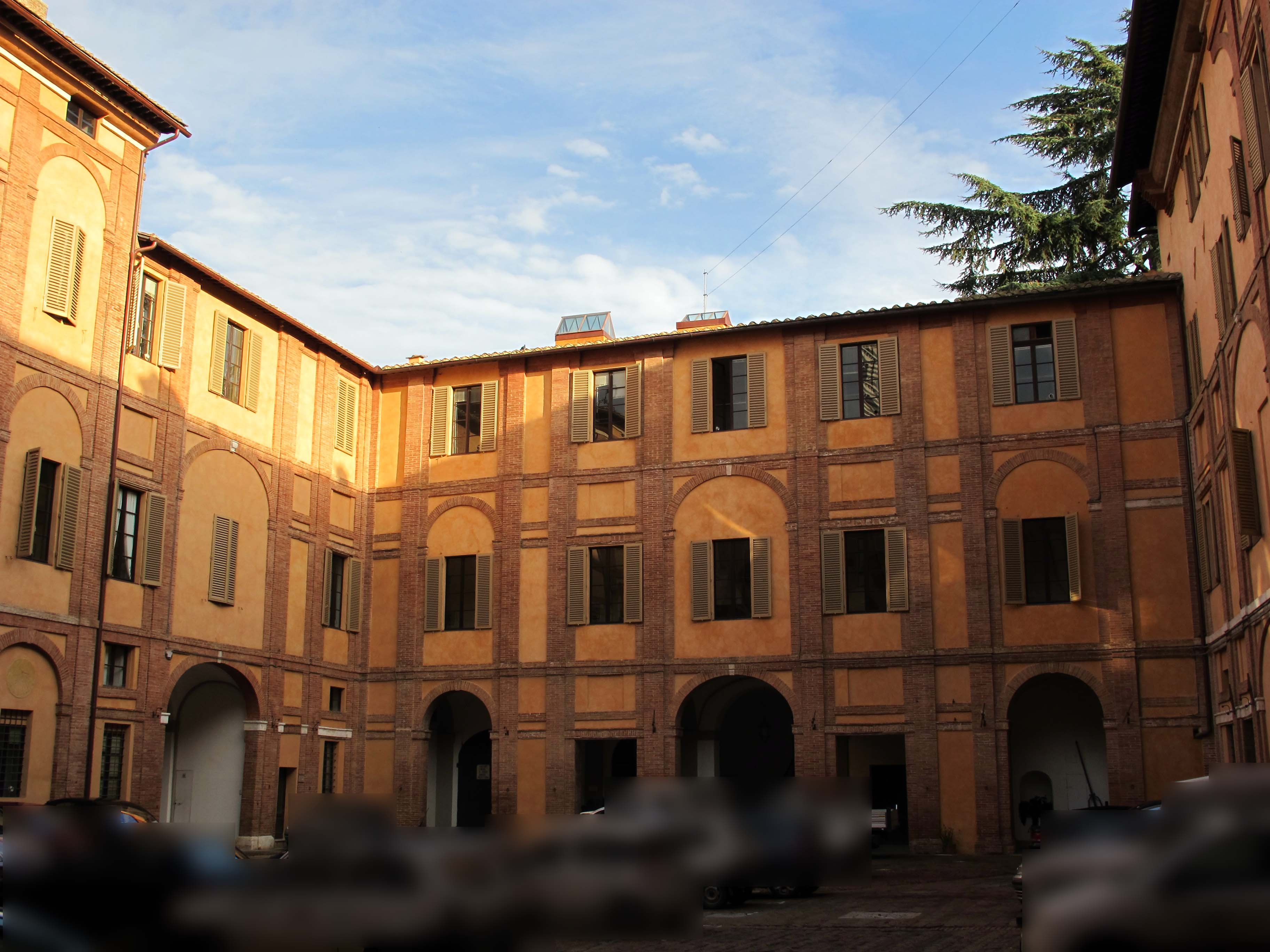 Siena, piazza del Duomo e dintorni